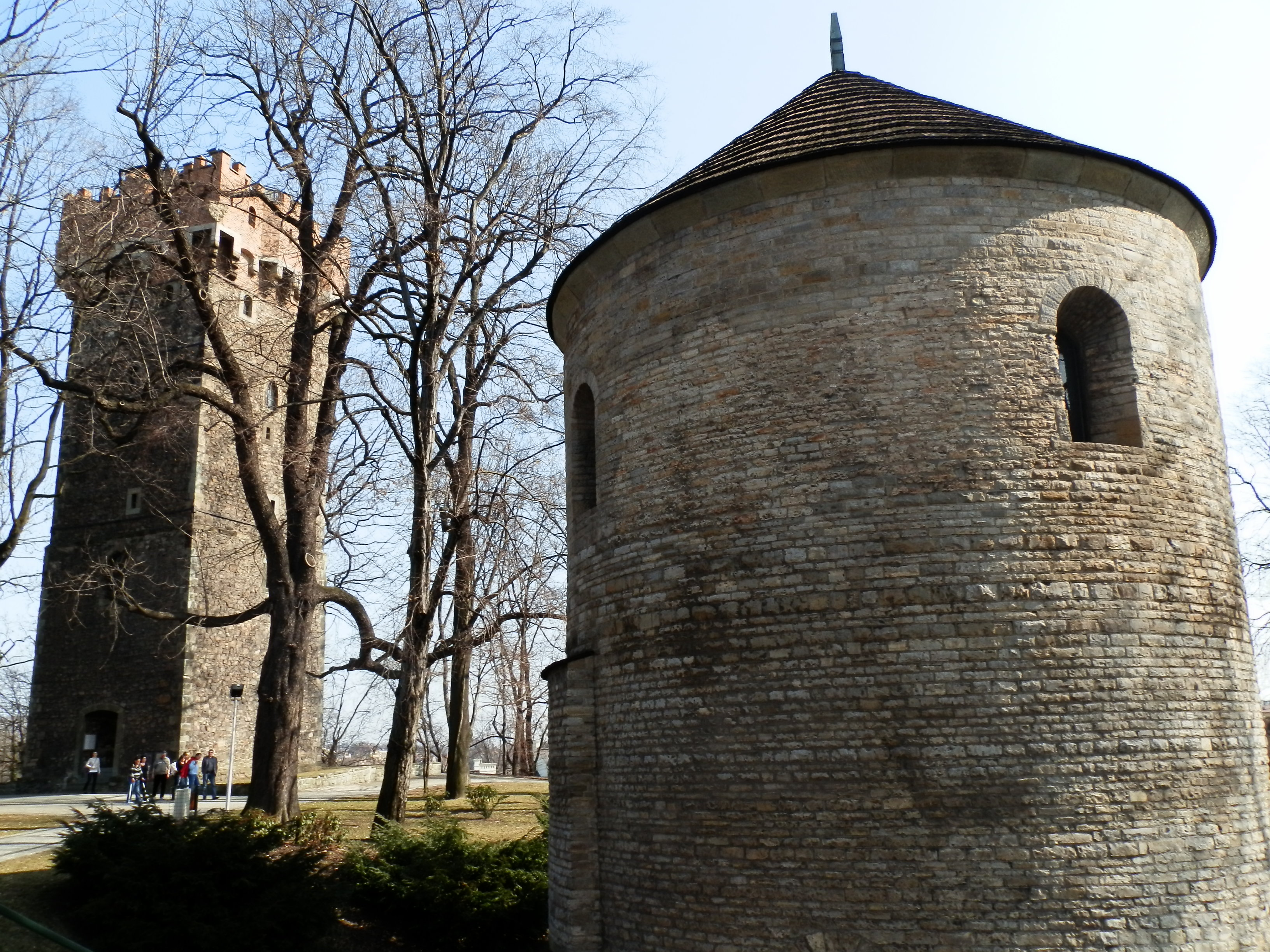 Kościół św. Mikołaja w Cieszynie.